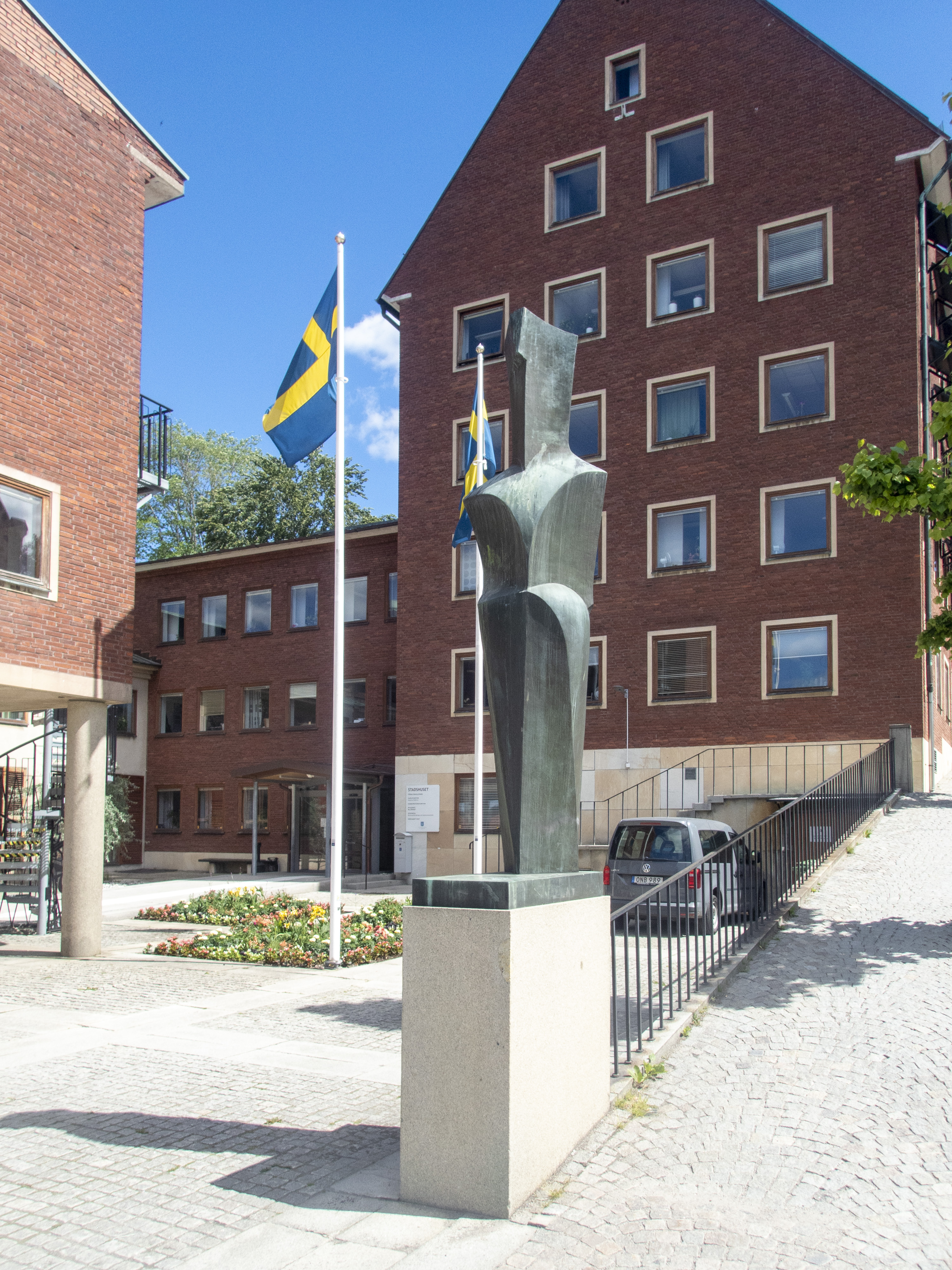 Apollo av Eric Grate framför Ulricehamns stadshus. Byggnadsår 1957. Folke Sundberg (Inredningsarkitekt) Sten Gumaelius (Arkitekt) Viking Göransson (Arkitekt)